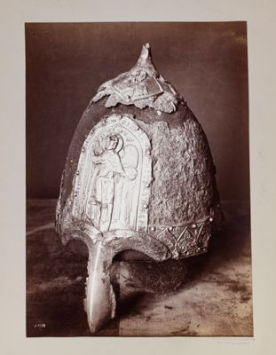 Шелом князя Ярослава Всеволодовича XIII в. Бронный зал Оружейной палаты. Архив Музеев Московского Кремля, Ф.60, д.32, л.119.